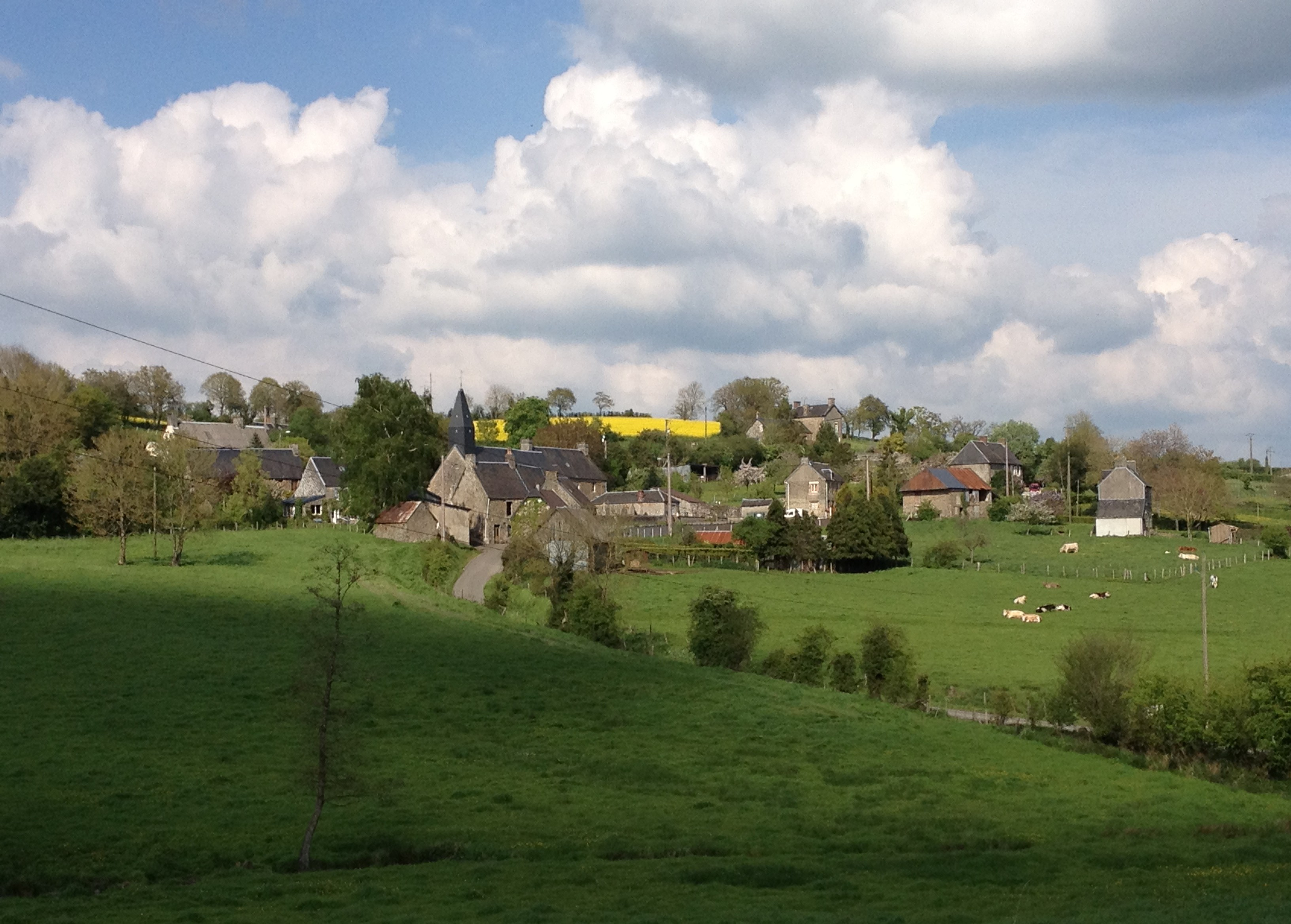 Vue sur le bourg de La Chapelle-Engerbold depuis la route de Vassy.